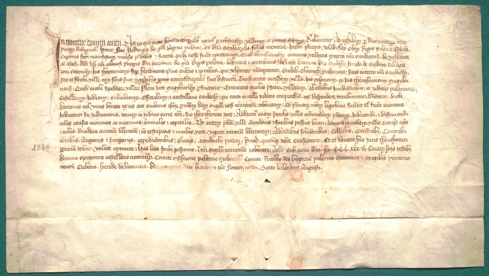 Jadwiga królowa i pani sądecka przenosi 3 wsie podkoniuszego krakowskiego, Gedki, w ziemi sądeckiej Gródek, Glinik i Przydonica z prawa polskiego na niemieckie. Język: łac. Opis zewnętrzny: oryg., 1 k. pergaminowa, 42,5 x 19 + 4,5 cm; otwory po pieczęci